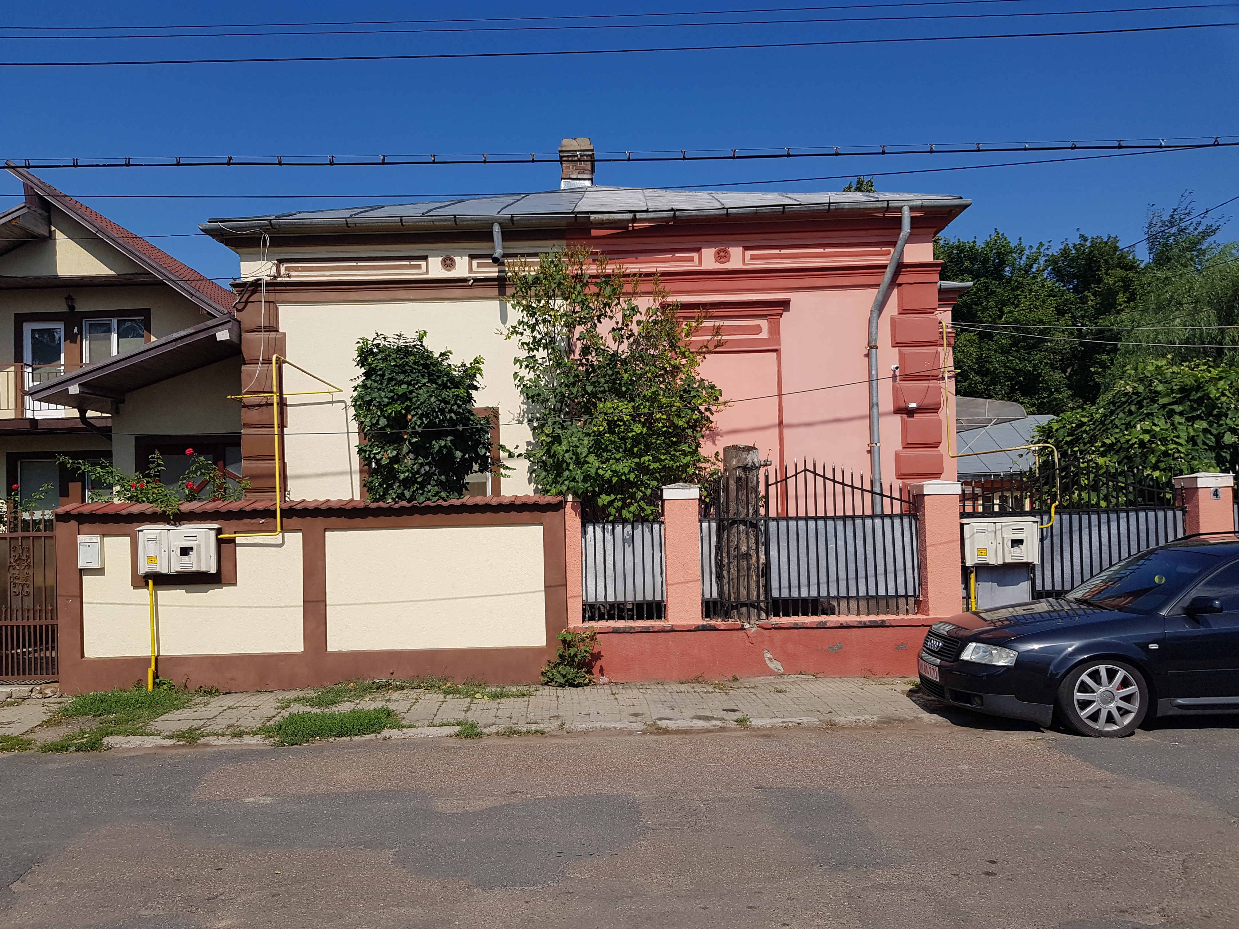 Monument istoric